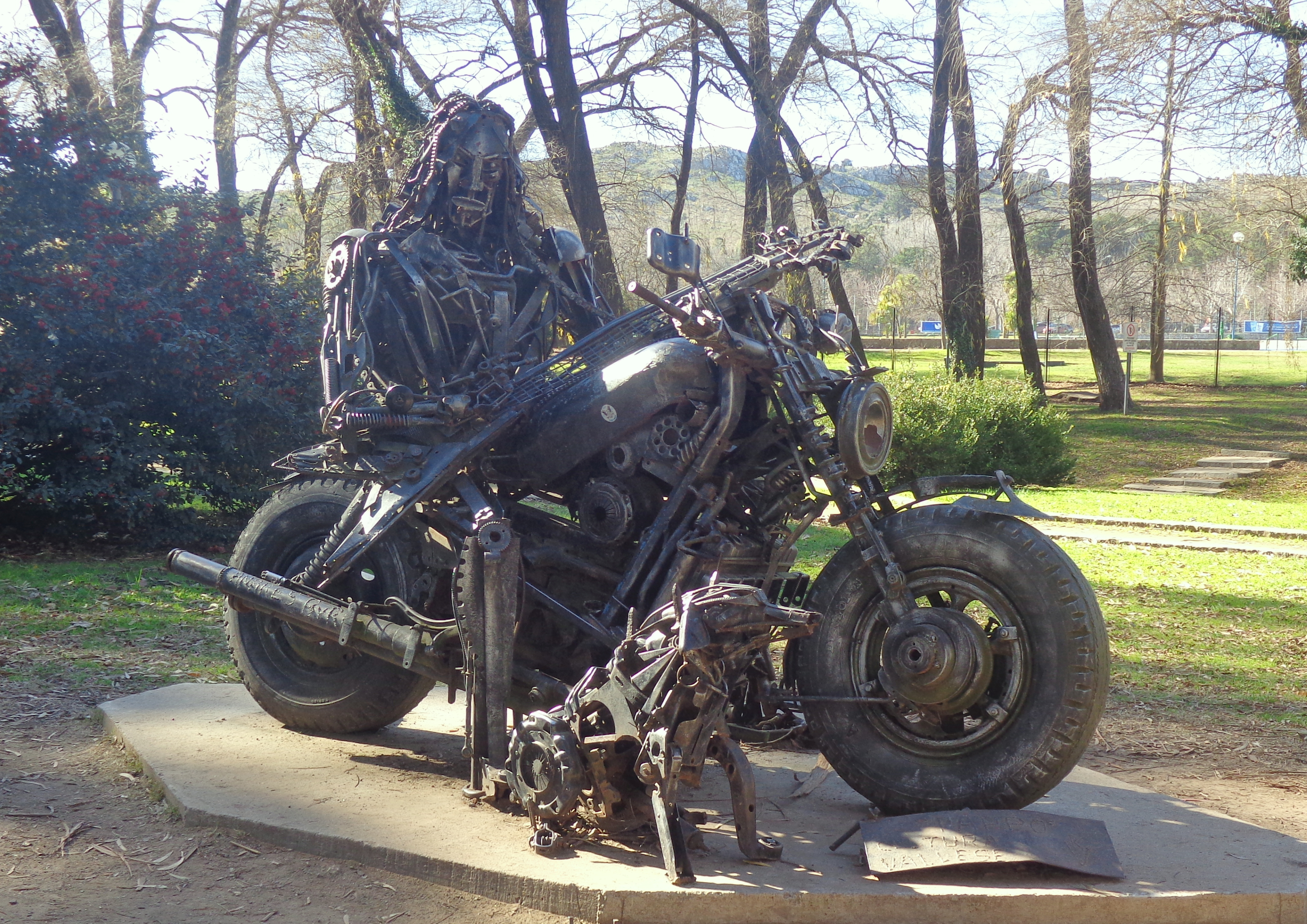 Estatua de Pappo (año 2015, hecha de hierro y chatarra por los artistas de Cultura Vallese). Se encuentra en las cercanías del lago del Fuerte, Tandil, Provincia de Buenos Aires, Argentina.